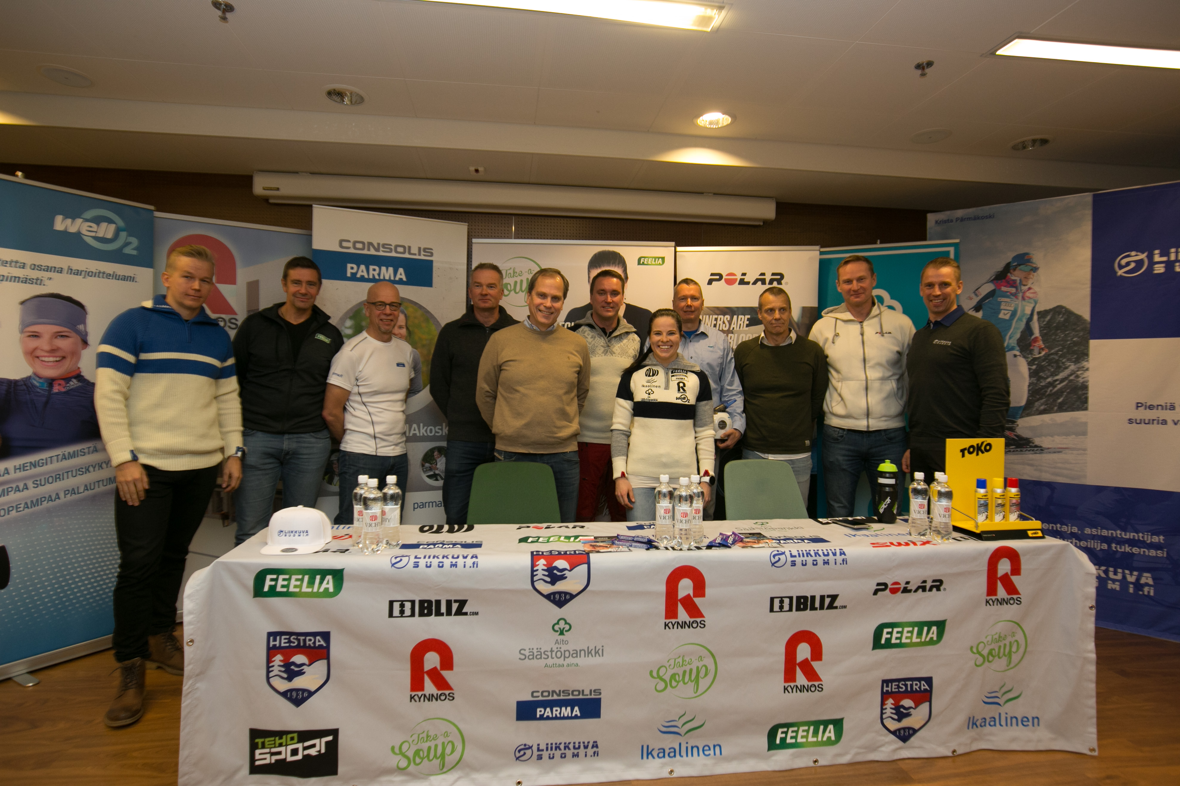 Team #PARMAKOSKI on Krista Pärmäkosken kumppaneista koostuva tiivis yhteisö.